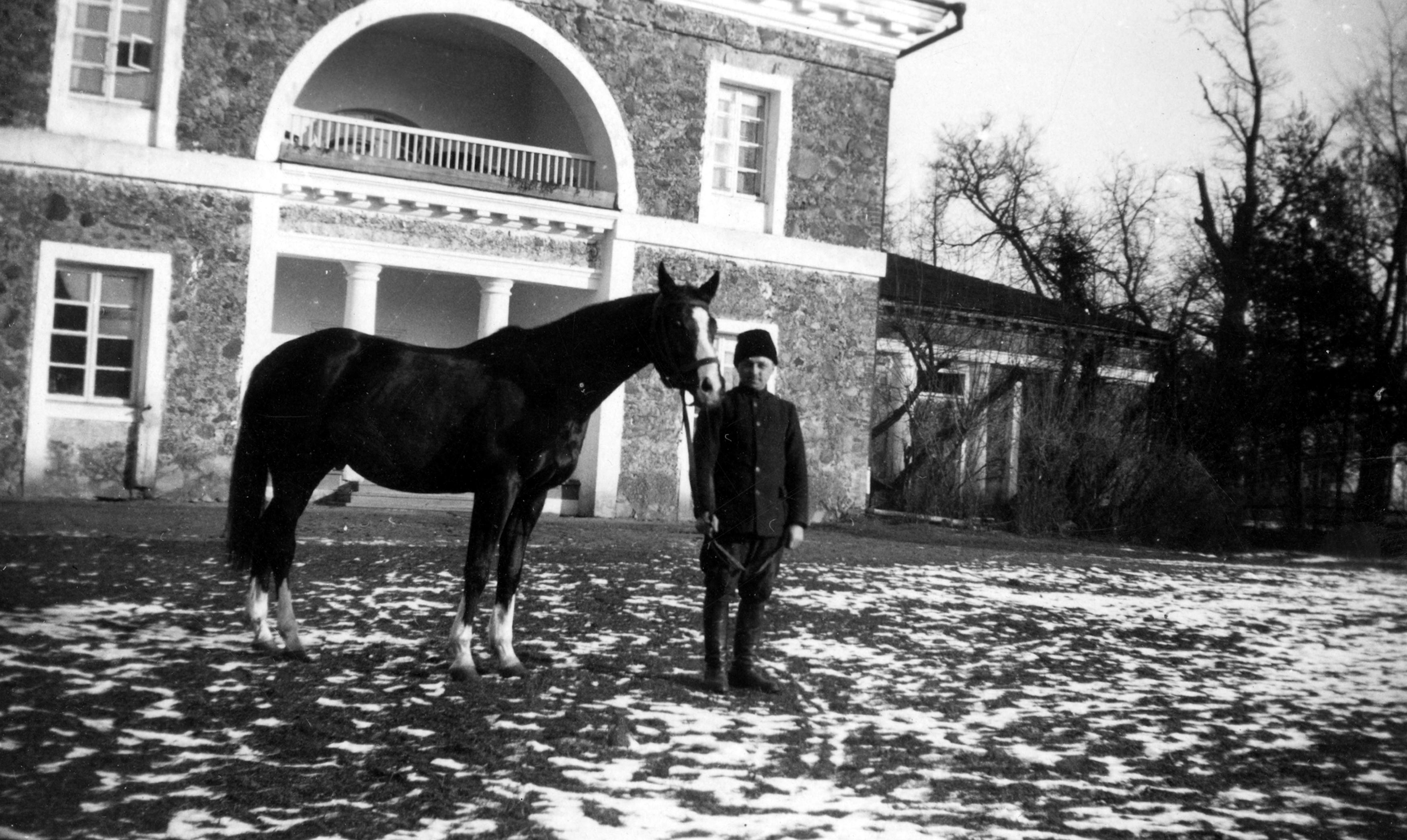 Беларуская (тарашкевіца): Жалудок (Žałudok), сядзіба Сьвятаполк-Чацьвярцінскіх (Śviatapołk-Čaćviarcinski). Стайня